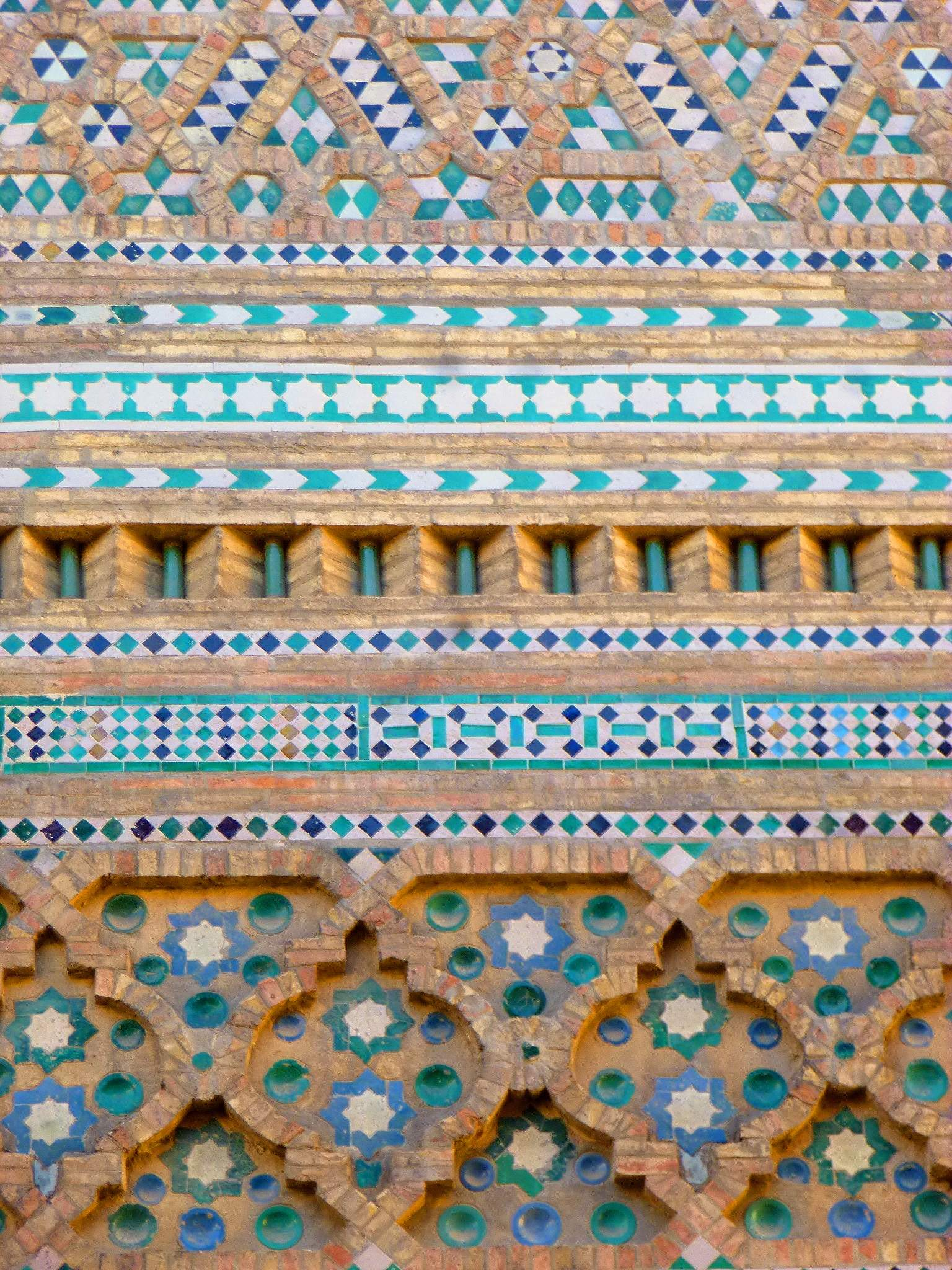 Zaragoza - Seo del Salvador, Ábside 8.JPG